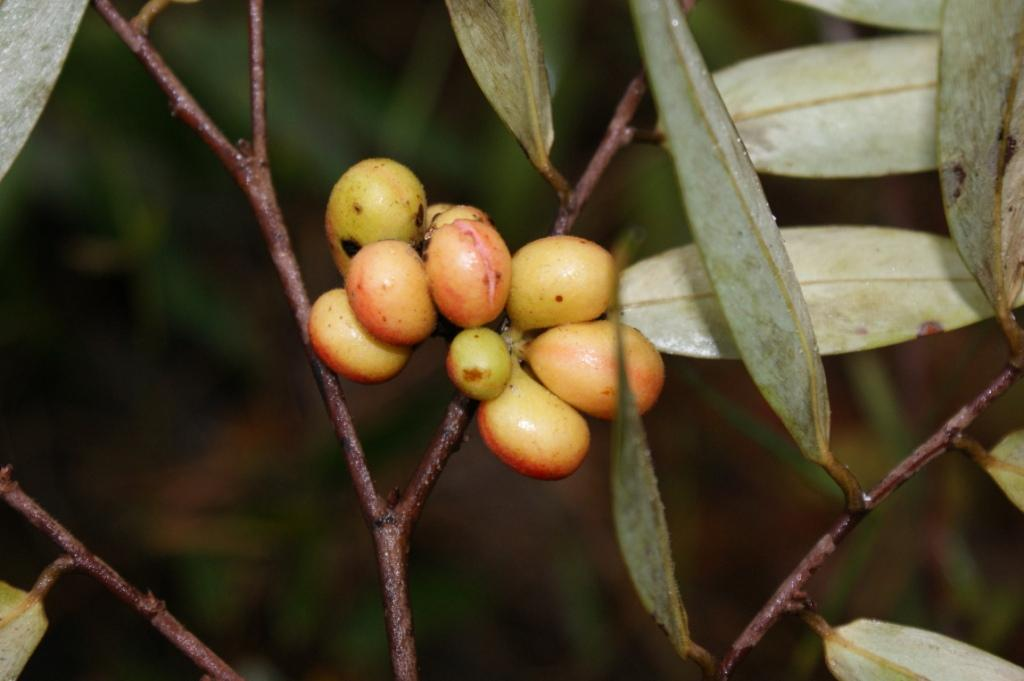 Xylopia sericea - ANNONACEAE Jardim Botânico de Brasília - Distrito Federal - Brasil.